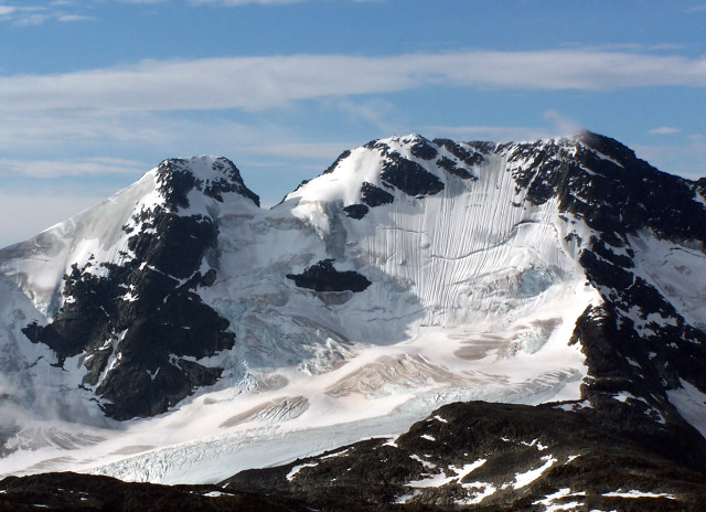 Gjertvasstind og Styggedalstindene sett fra Fanaråkken, august 2004. Foto: Tore Røraas.